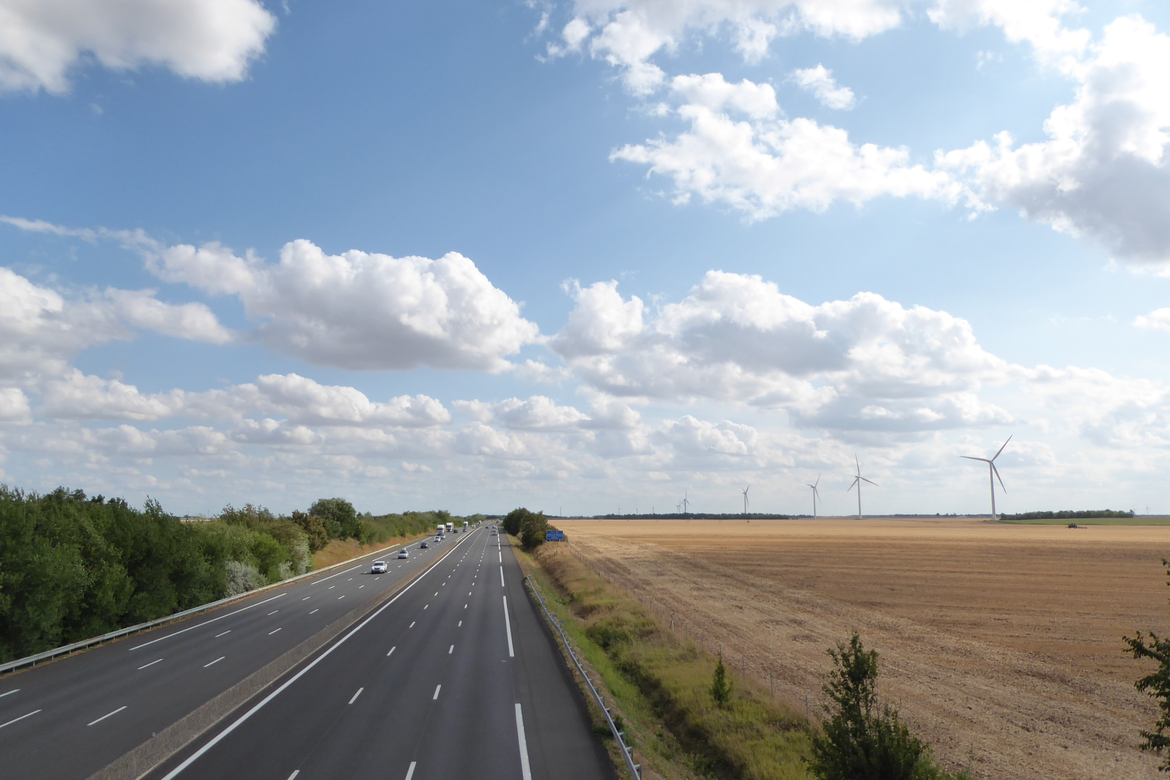 L' A10 vue de la D142.2 reliant Levesville-la-Chenard à Mérouville, Neuvy-en-Beauce, Eure-et-Loir, France. L'aire de service des Plaines de Beauce, sur la commune de Fresnay-l'Evêque, est à 2000 m au sud.